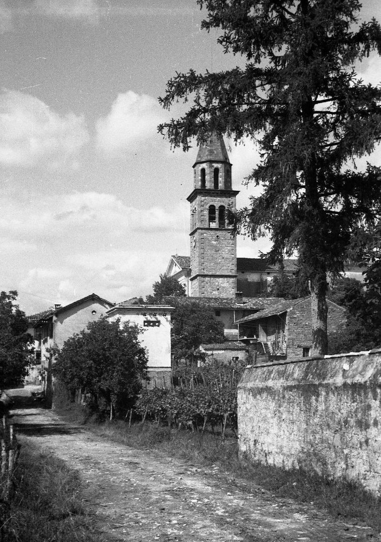 Biljana.